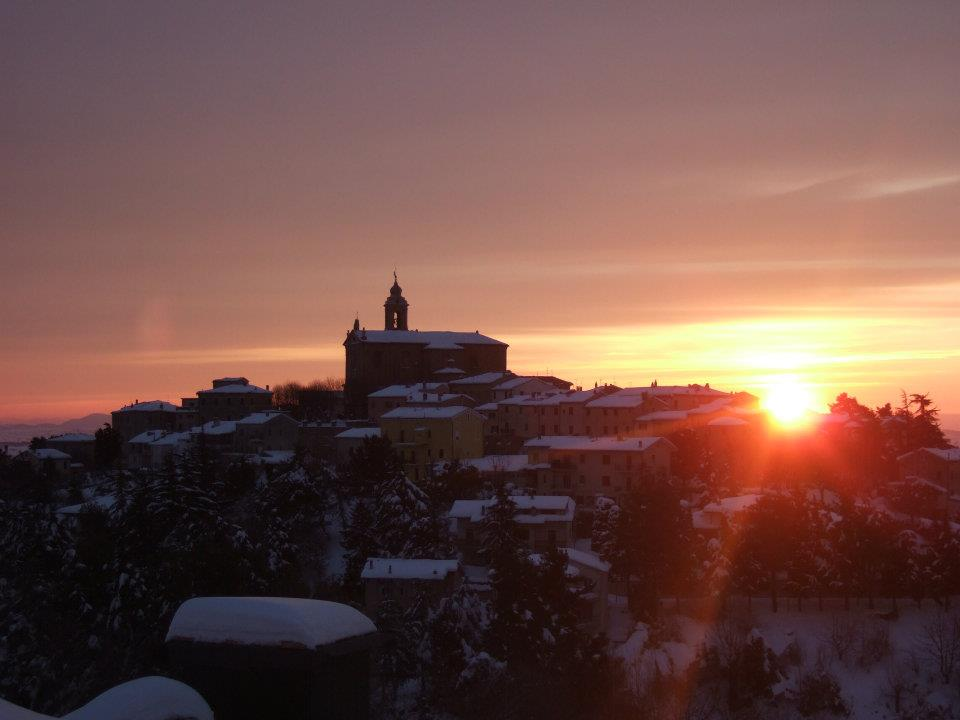 Il centro storico innevato